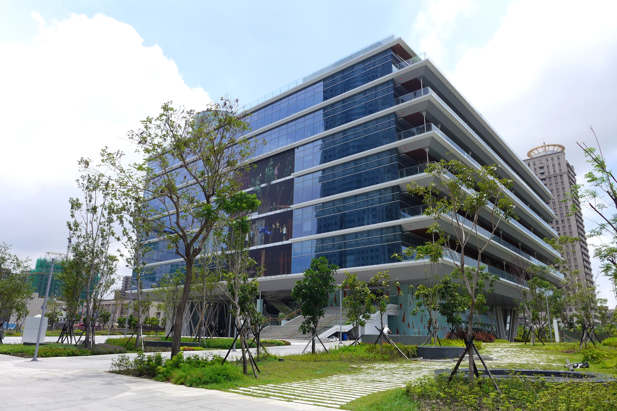 Kaohsiung Main Library